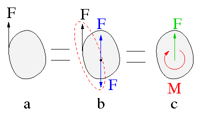 Durch Addition einer Gleichgewichtsgruppe (blau) entsteht ein äquivalentes Kraftsystem aus versetzter Kraft (grün) und einem Versatzmoment (rot)